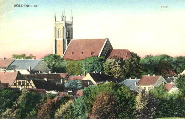 Dobiegniew ok. 1900.Woldenberg, Neumark about 1900